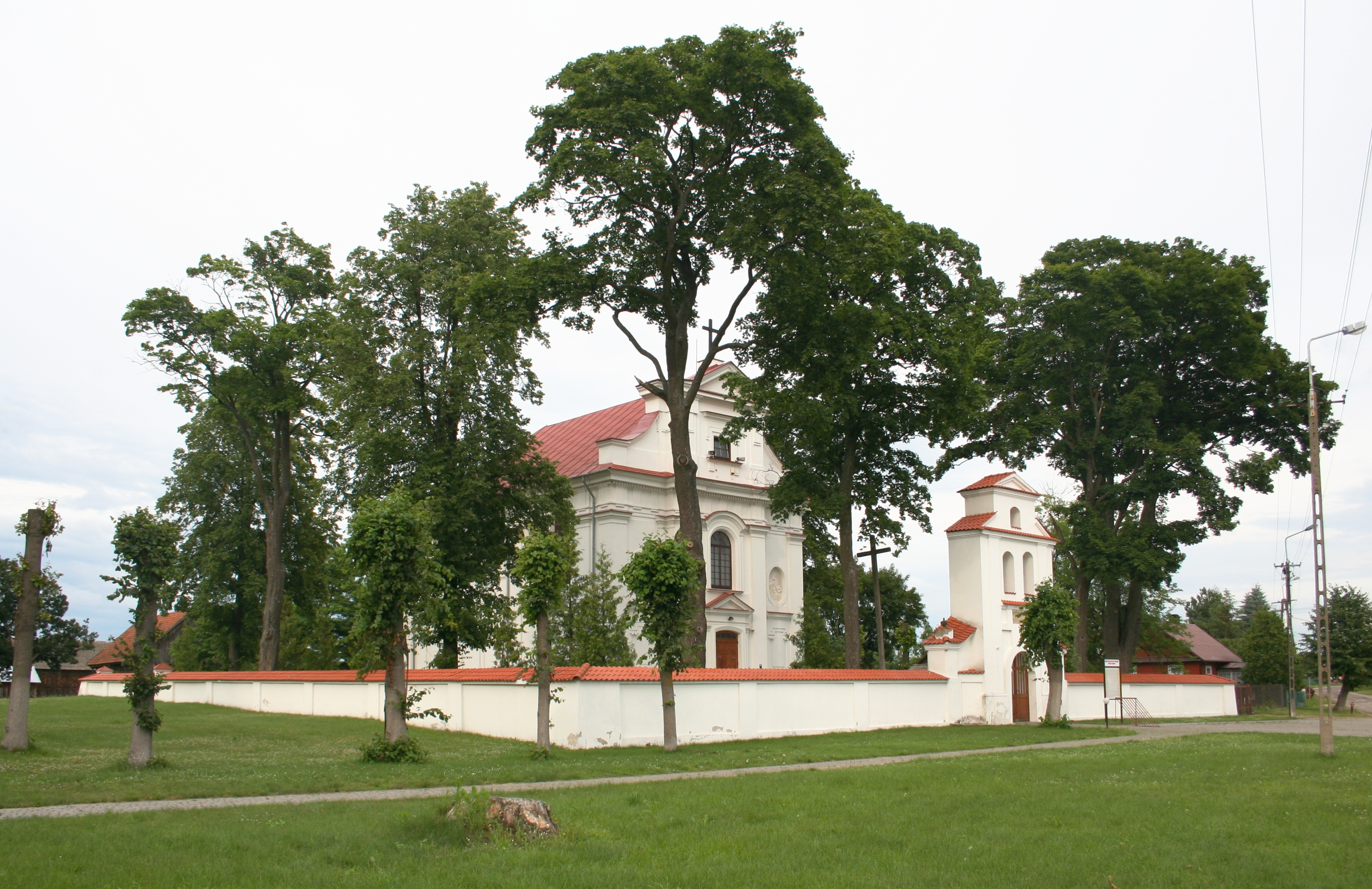 Niemirów, kościół św. Stanisława biskupa i męczennika; gmina Mielnik, woj. podlaskie.